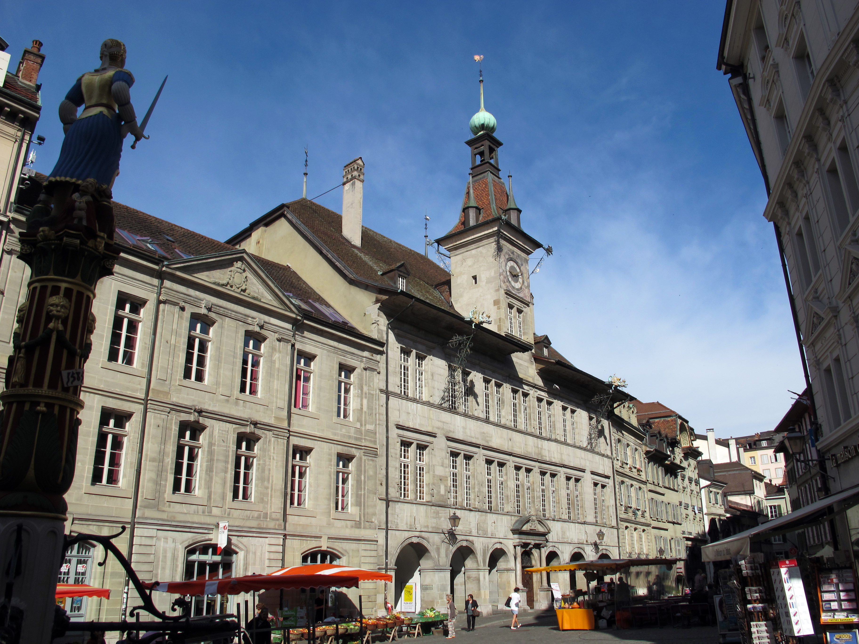 Losanna, Svizzera